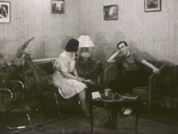 Image du film À la croisée des chemins Jean annonce à sa mère son intention de devenir missionnaire en Chine.